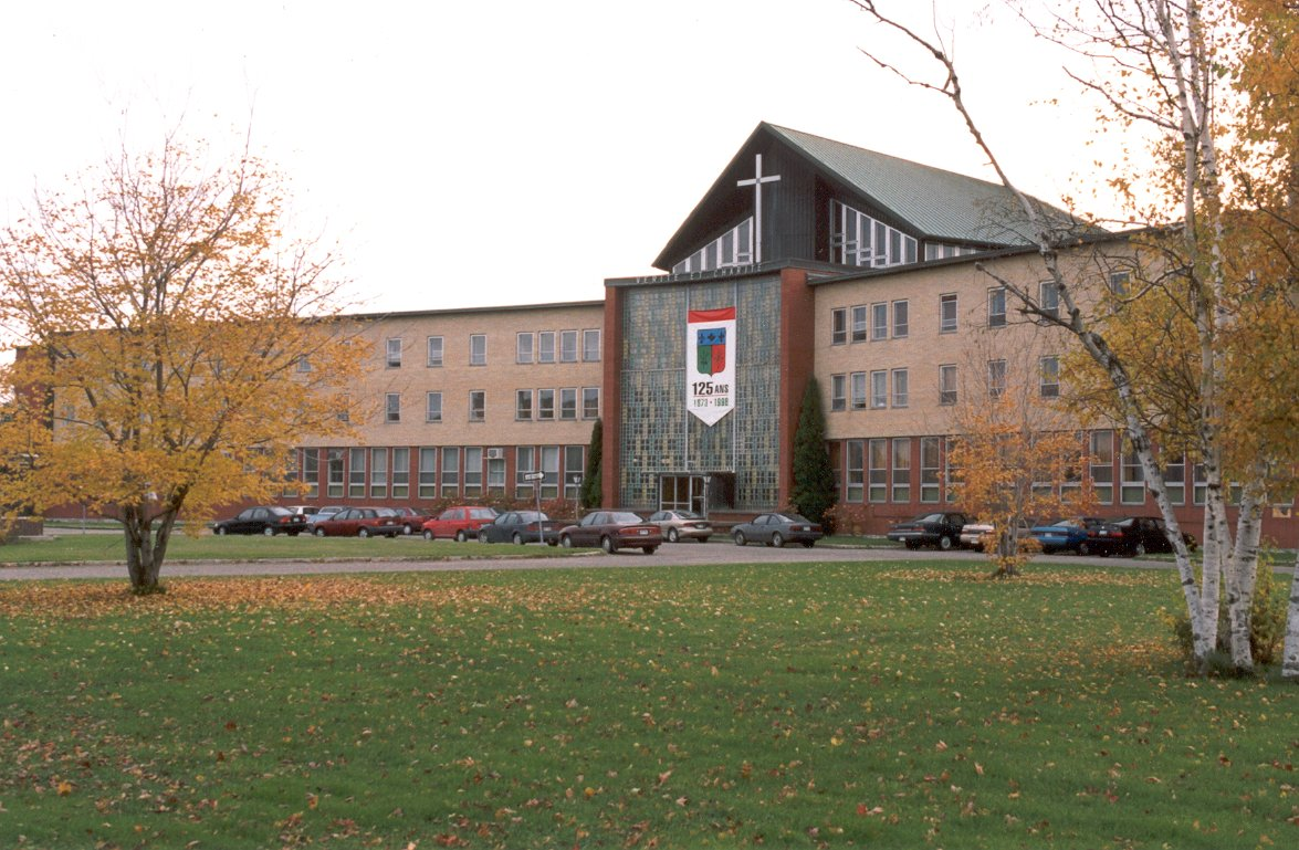 Séminaire de Chicoutimi sur la rue Chabanel, avant la réfection de la façade.